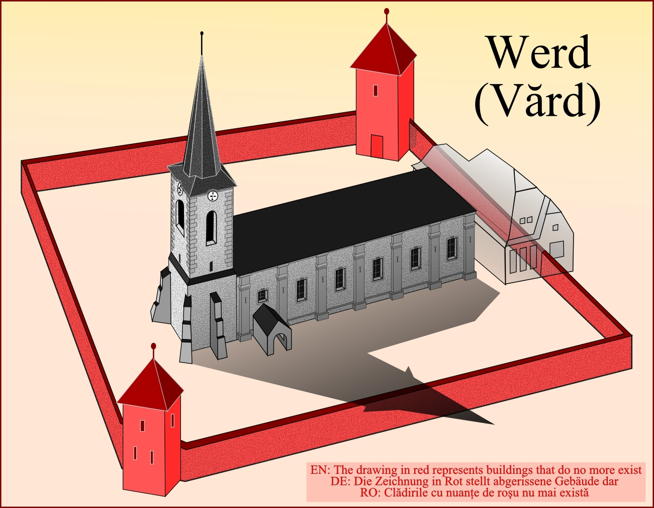 Biserica fortificata din Vard.